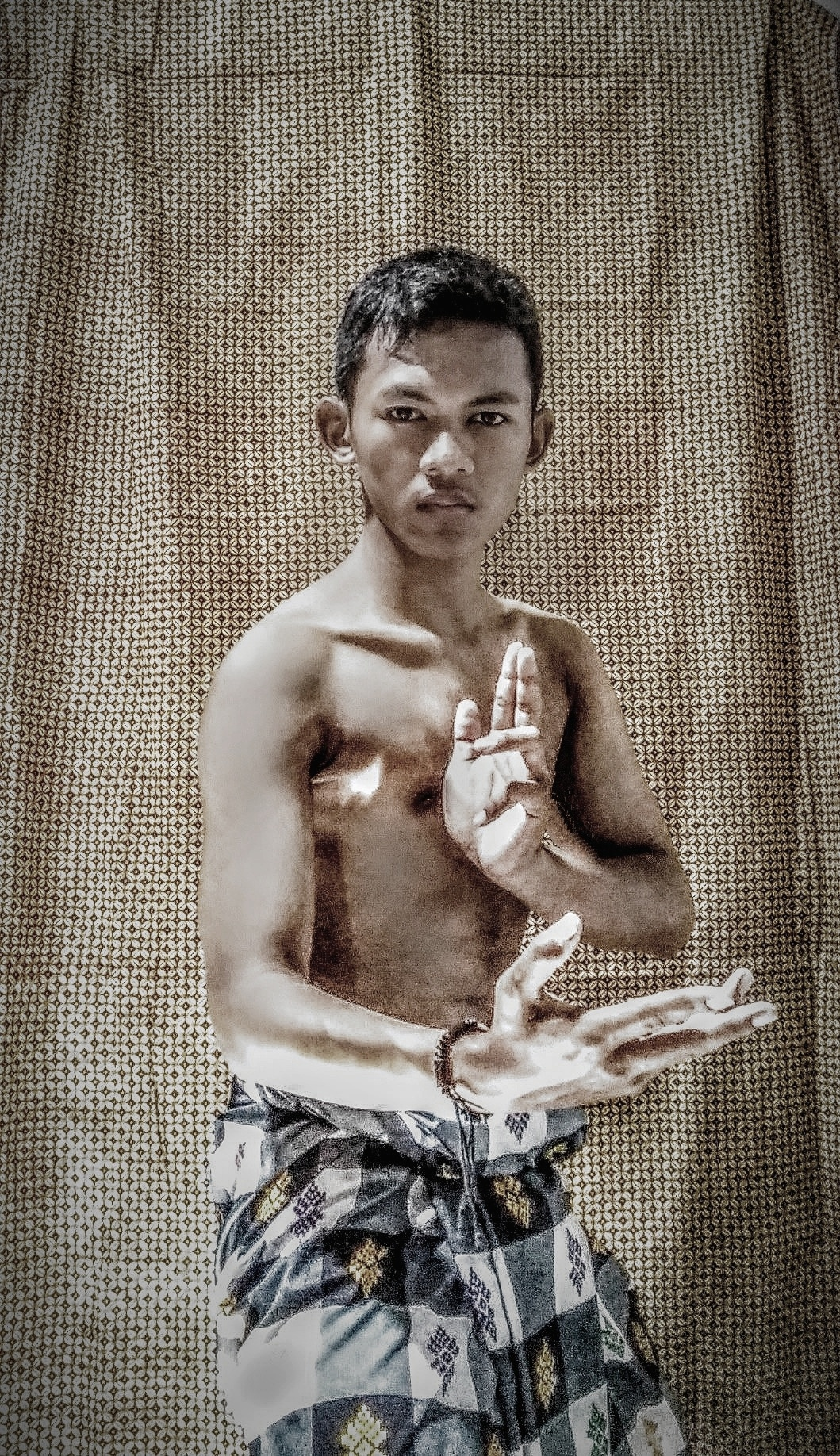 Pencak Silat merupakan seni bela diri tradisional dari Nusantara